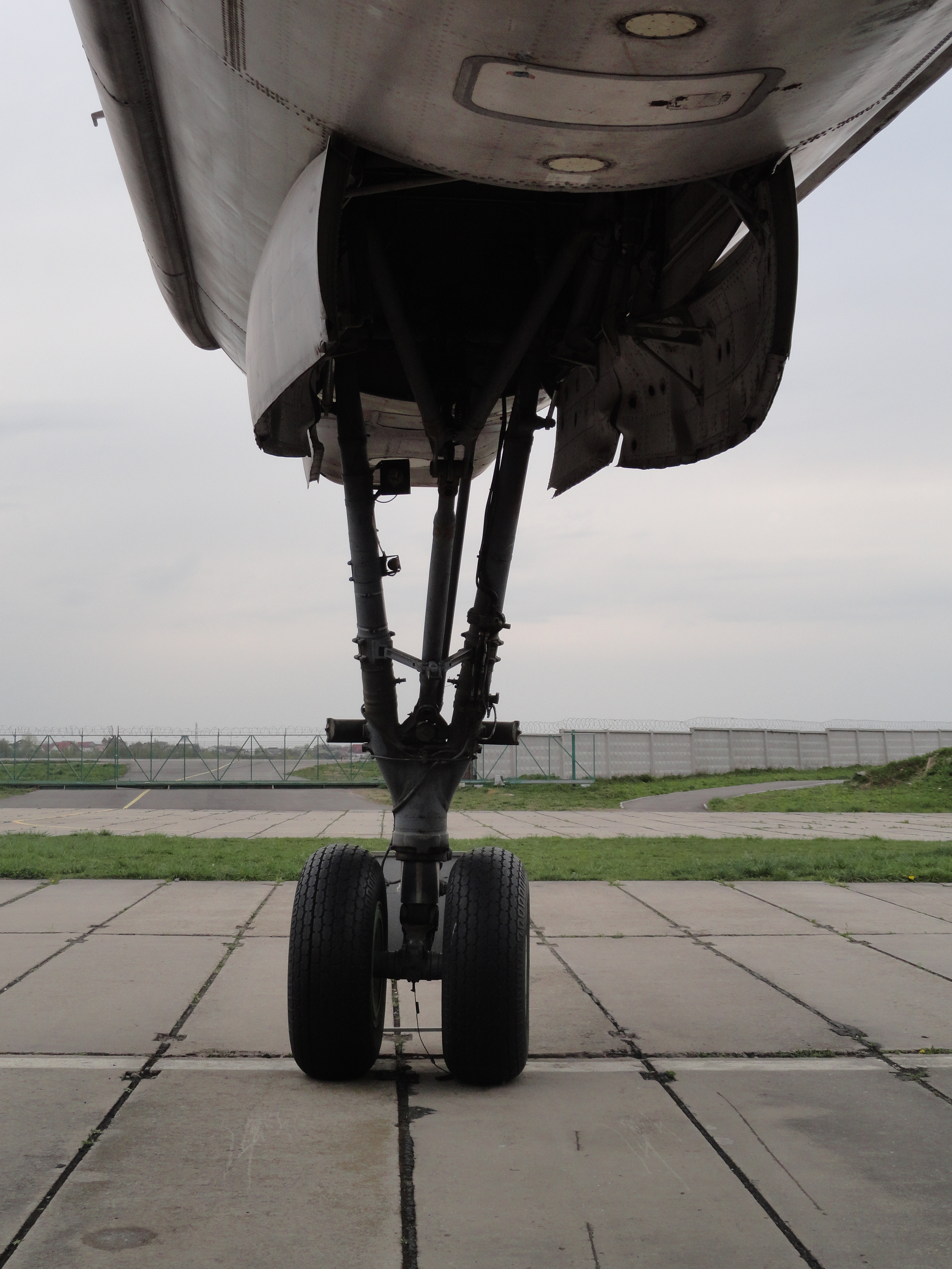 Носовая стойка шасси самолёта Ту-142. Фото сделано в Киевском музее авиации.